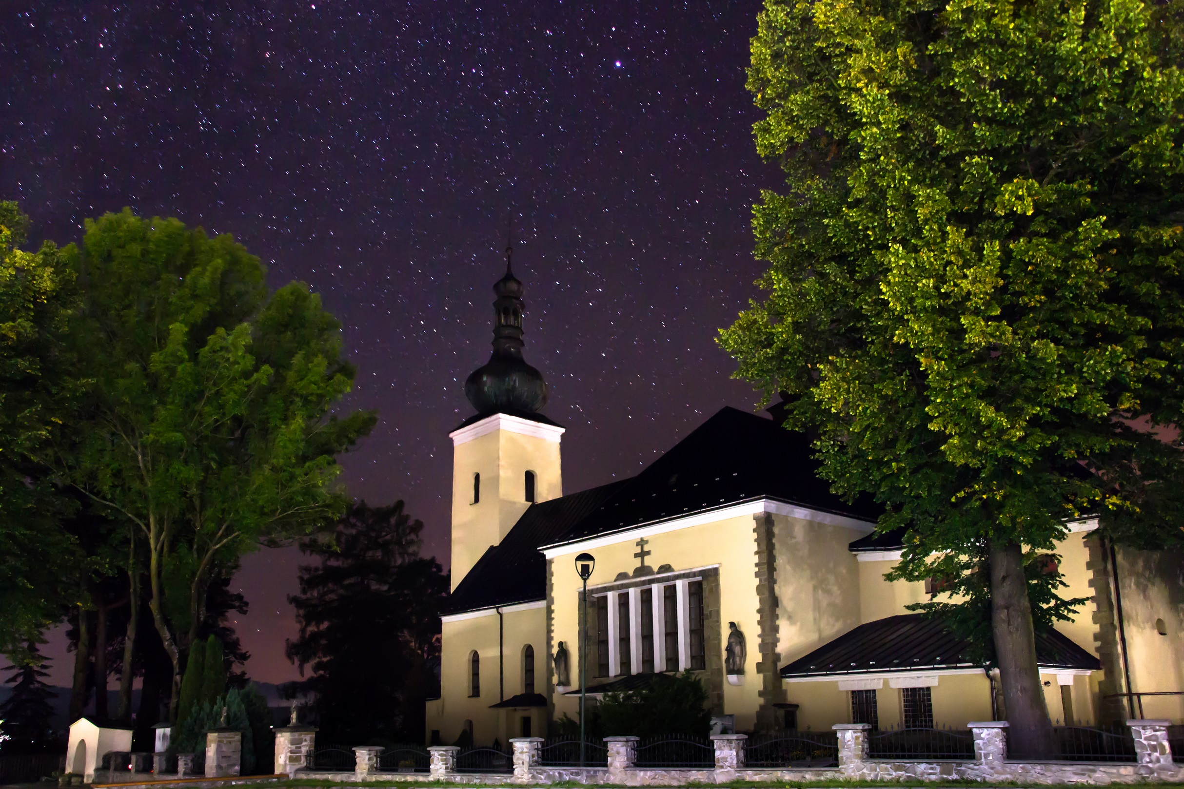 Kostol v Rabči